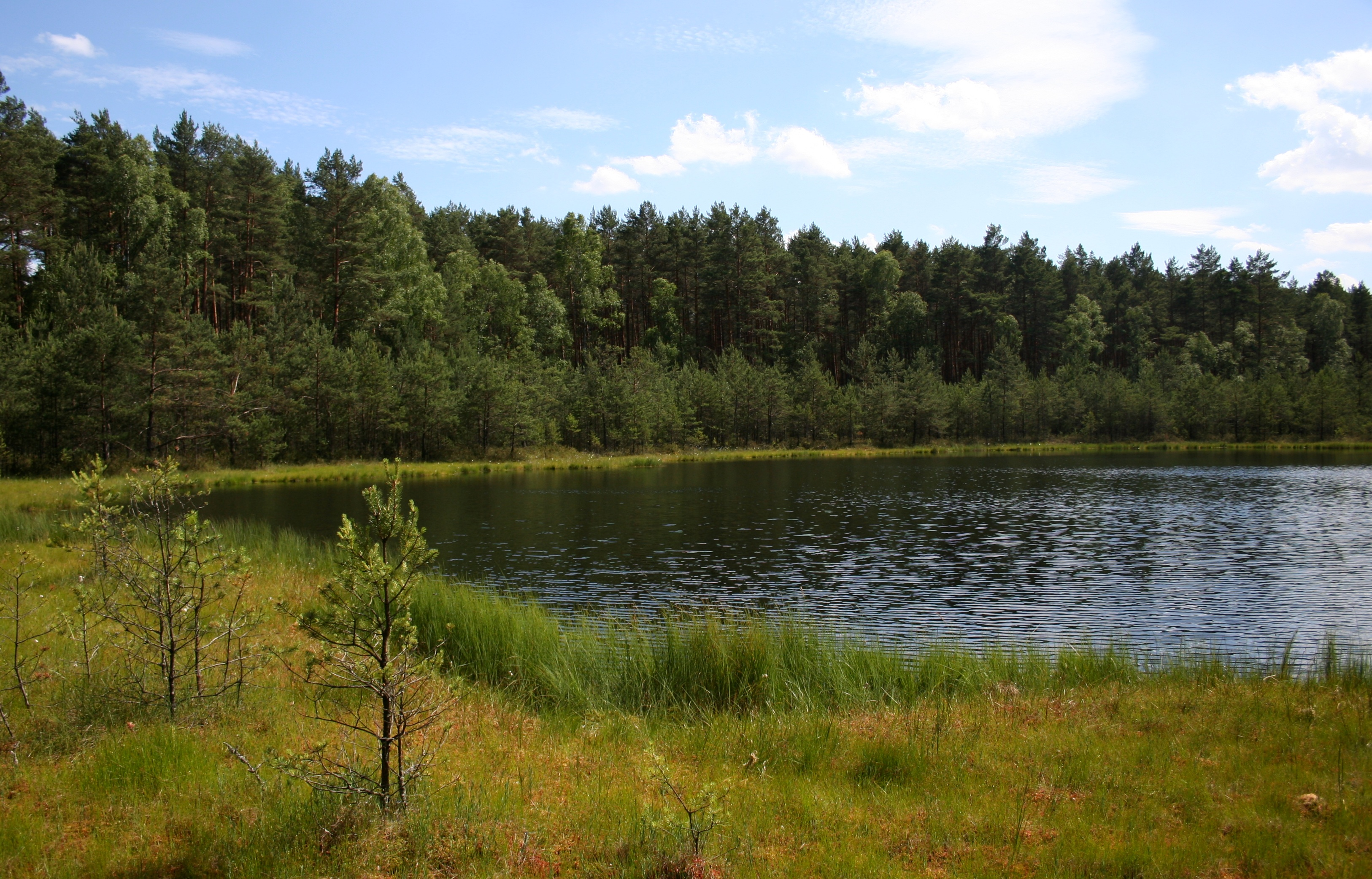 rezerwat Dury, Wdecki Park Krajobrazowy - jedno z 4 jezior dystroficznych